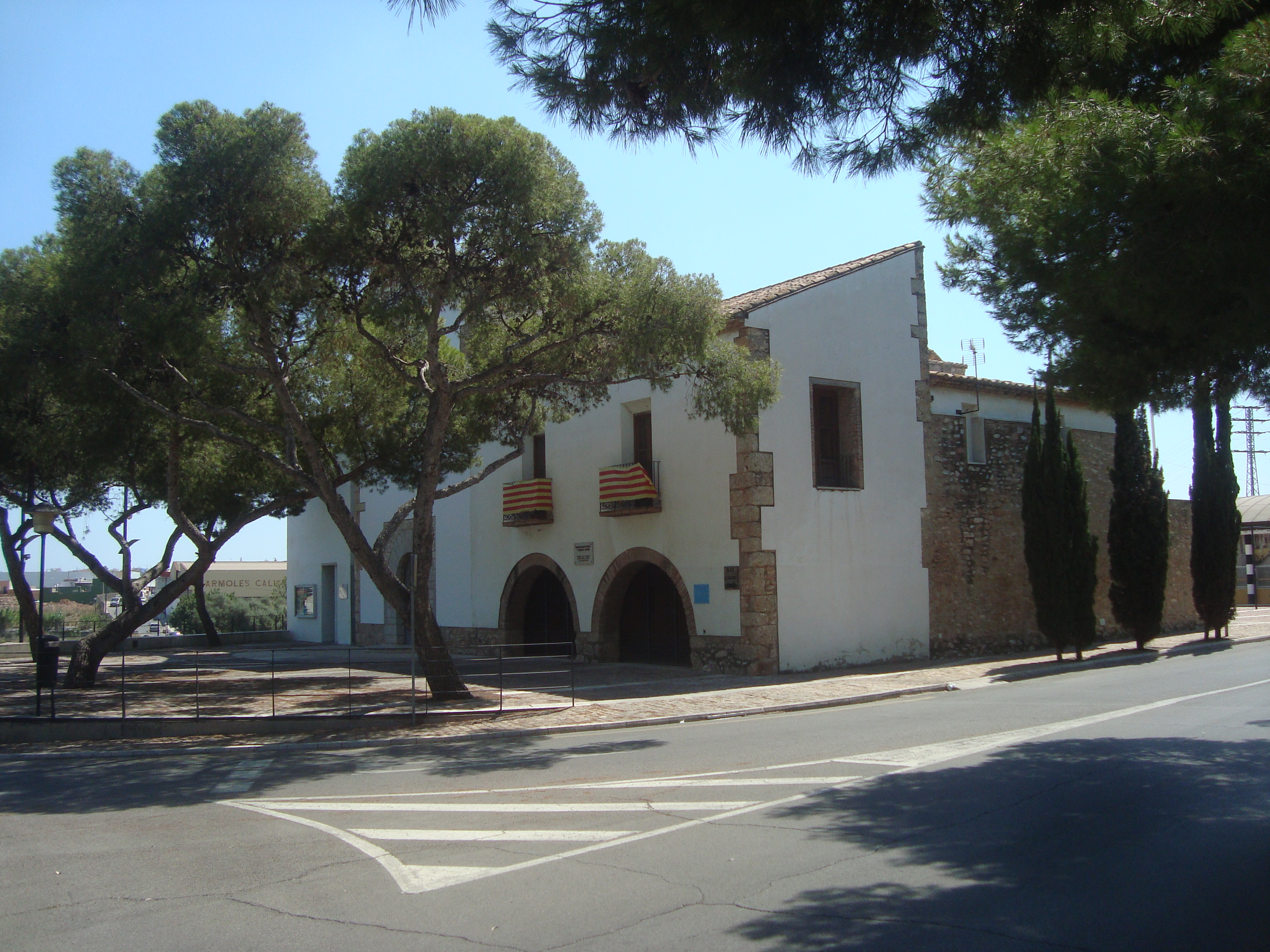 La Ermita de Santa Quitèria, es una de las ermitas más populares de la comarca de la Plana Alta, la ermita se encuentra a unos 4 km de la población de Almassora, subiendo curso arriba del río Millars (Mijares). En la ribera izquierda del río y sobre un pequeño talud, se encuentra esta antigua ermita de anacoretas, un lugar muy querido y visitado por los vecinos de la población de Almassora. En sus proximidades se hallan el famoso Puente de Santa Quiteria, de origen medieval, y el Assut o Azud, antigua obra de ingeniería hidraúlica para el riego de las huertas de la zona.